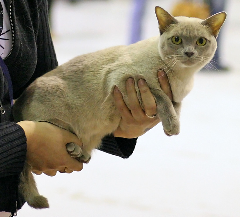 Burmese anglais durant l'exposition de Jyväskylä en 2007. Couleur lilas. EMS Code : PR Ninelli's Gigantická Gilda (Kiitu) [BUR c] female EX1 CAPIB NOM